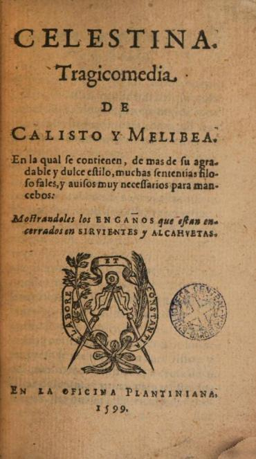 Portada de la edición de 1599